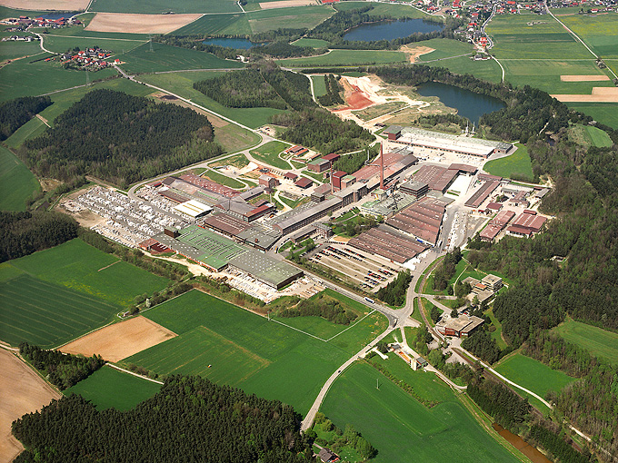 Deutsche Steinzeug Cremer & Breuer AG: Produktionsstandort Schwarzenfeld im Landkreis Schwandorf